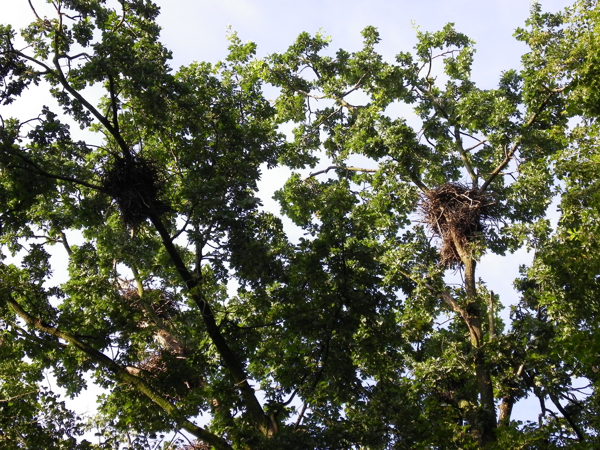 Буго-Деснянський, Вінницький район, Михайлівське лісництво, кв. 15-34, Стрижавська с/р — кв. 15, 17-21, 25, 26 = 424,0 га. Сосонська с/р, кв. 16, 22-24 = 198,0 га. Стадницька с/р — кв. 27-34 = 431,0 га.